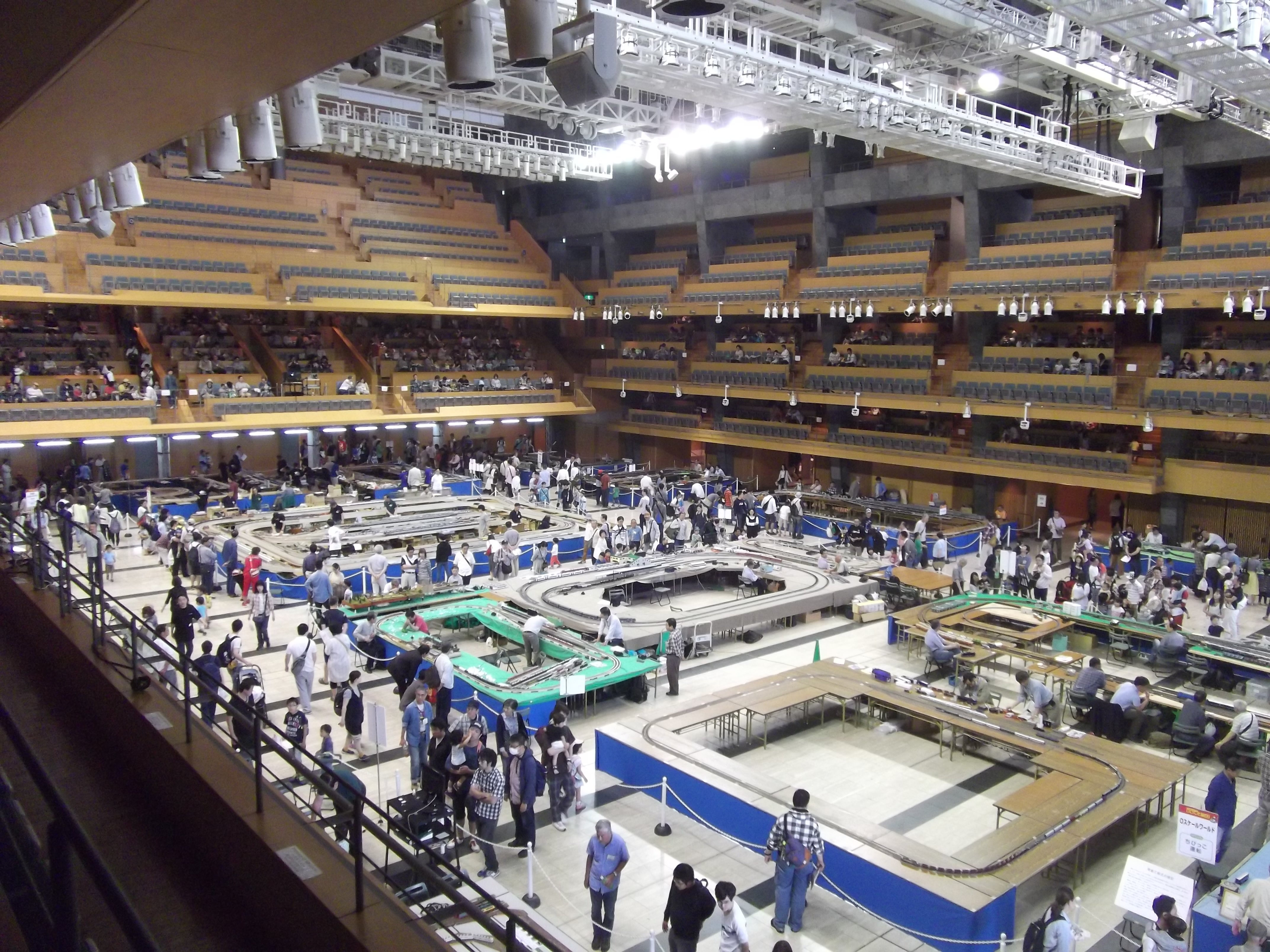 グランシップトレインフェスタ2016、大ホール・海の様子。